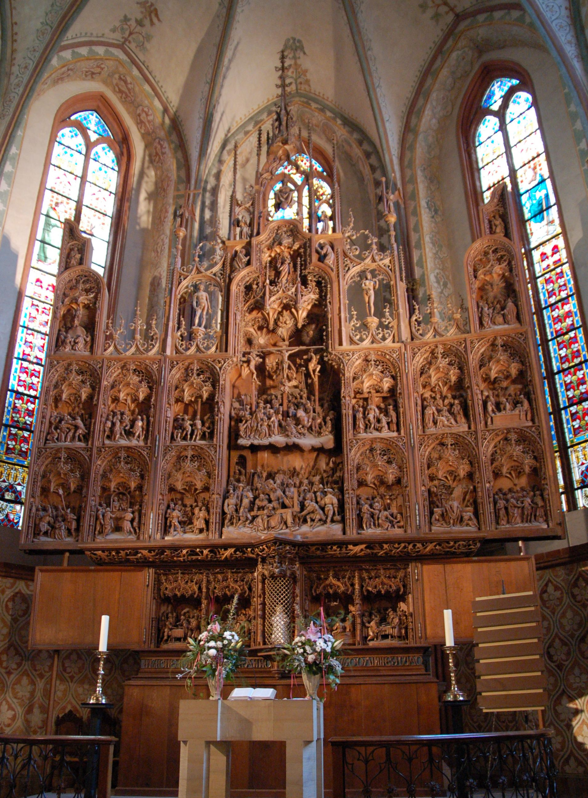 Brüggemann-Altar, Schleswig Cathedral, Germany